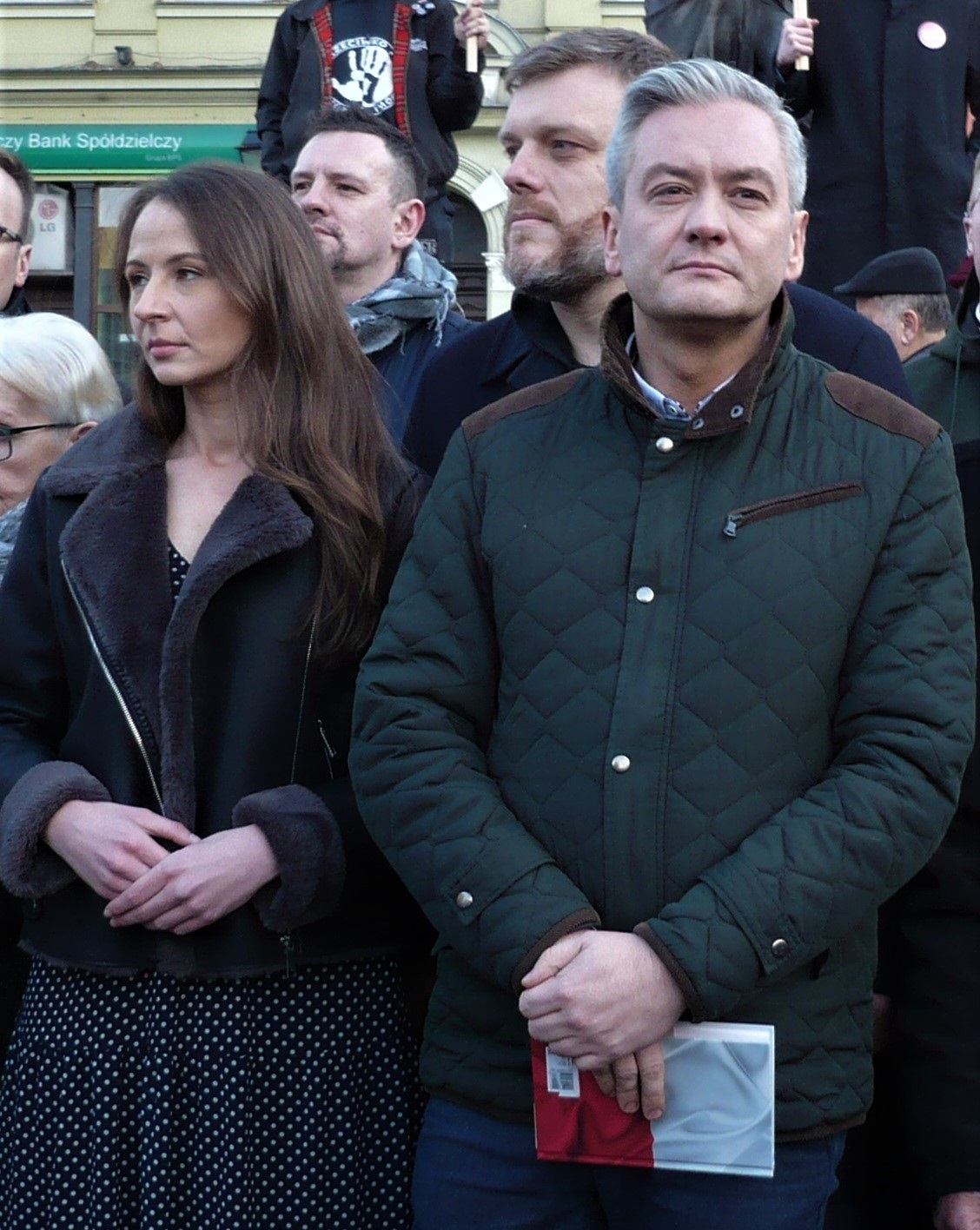 Protest przeciwko likwidacji oddziału wewnętrznego szpitala w Nowej Rudzie z udziałem: Roberta Biedronia, Adriana Zandberga, Agnieszki Dziemianowicz-Bąk, Marka Dyducha. Rynek, Nowa Ruda, 09.02.2020 r.